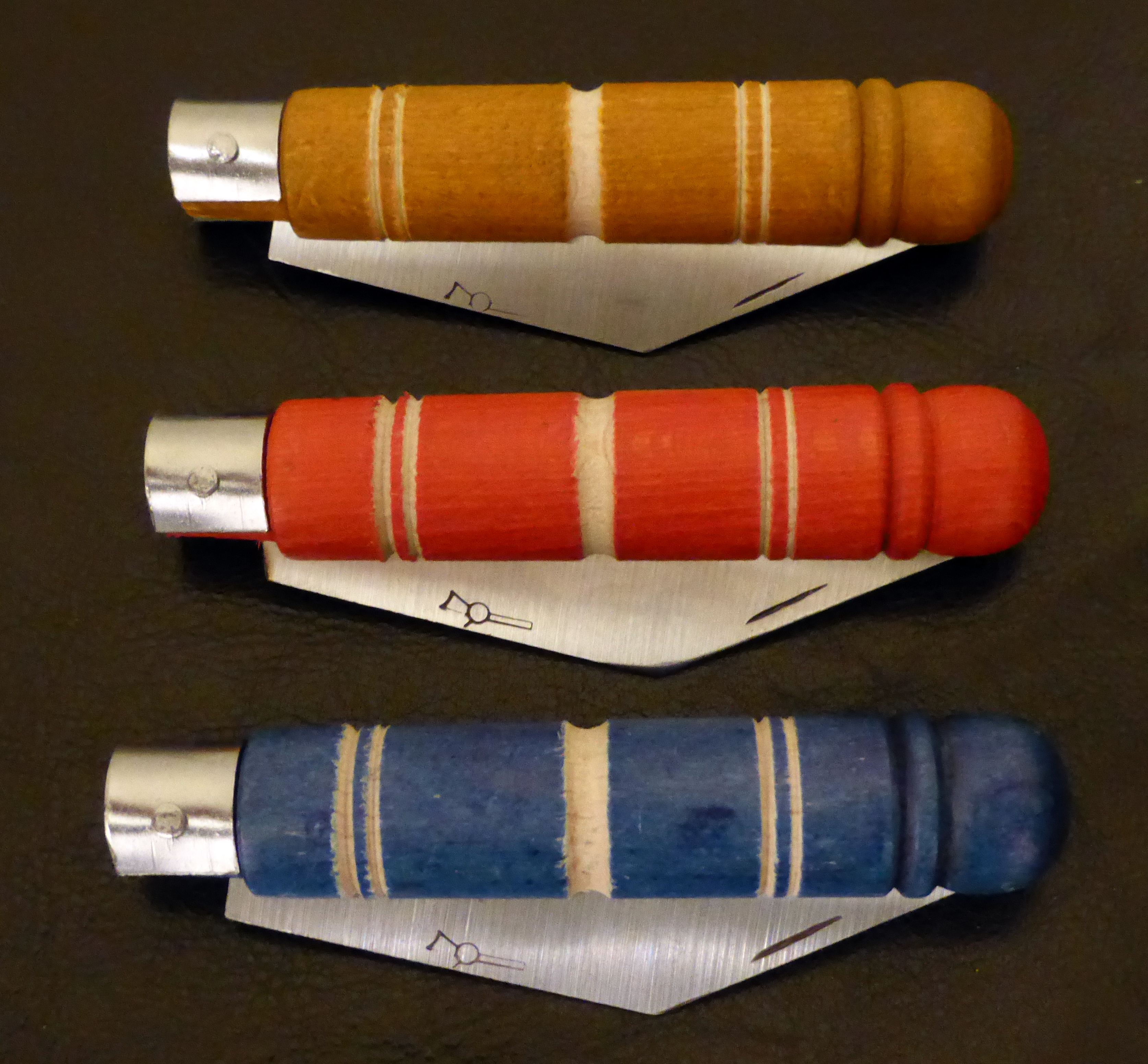 Trattenbacher Feitel, Taschenmesser - Immaterielles Kulturerbe in Österreich seit September 2015.